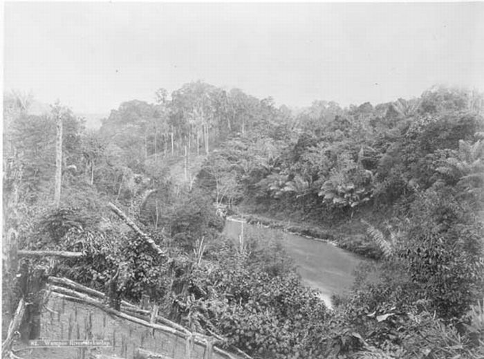 Foto. De Bekoelap rivier stroomt langs de plantage Wampoe van dhr. H.T. van Steeden.